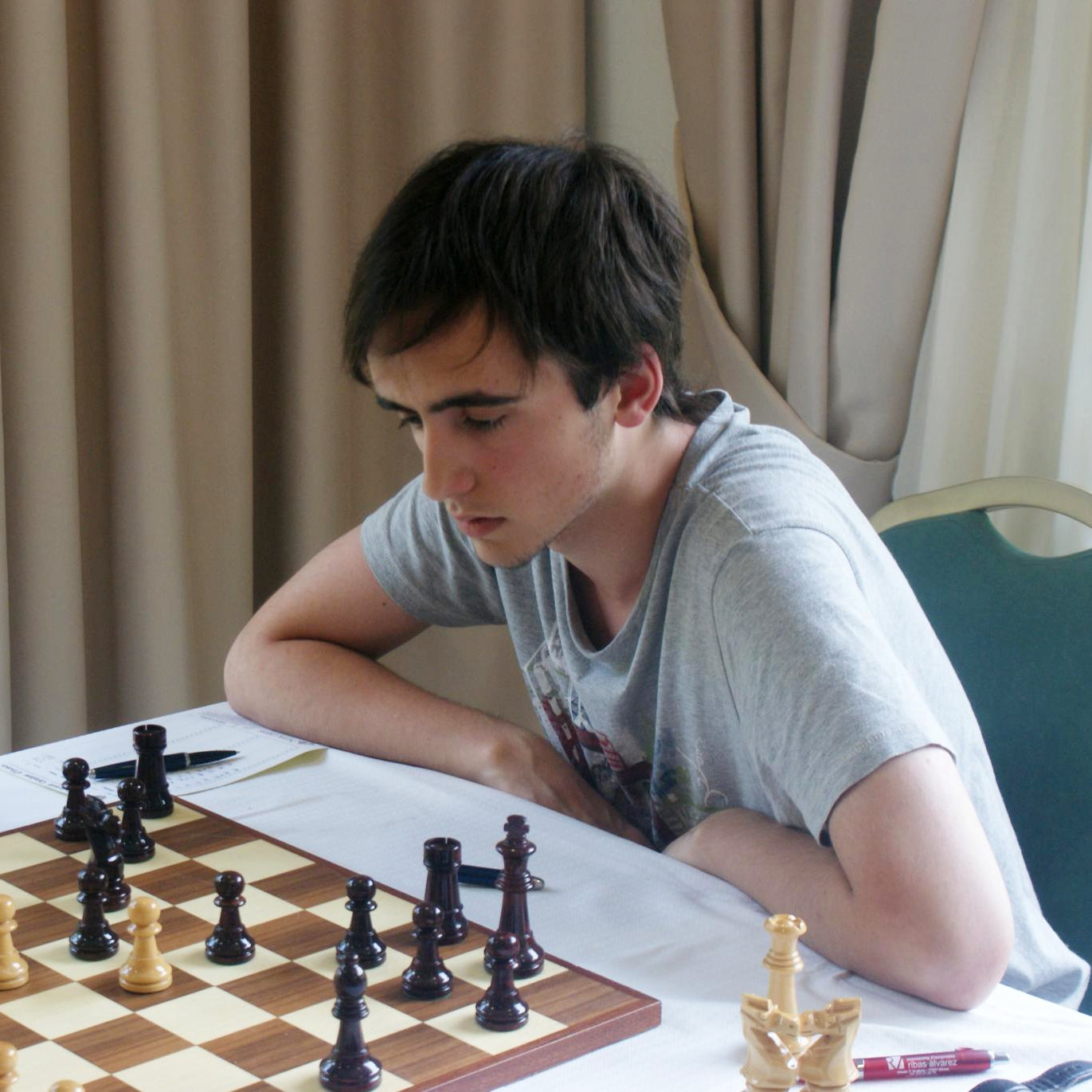 Alvar Alonso, 31è Open Internacional d'Andorra, Hotel Sant Gothard, Ronda 3 - 22/07/13